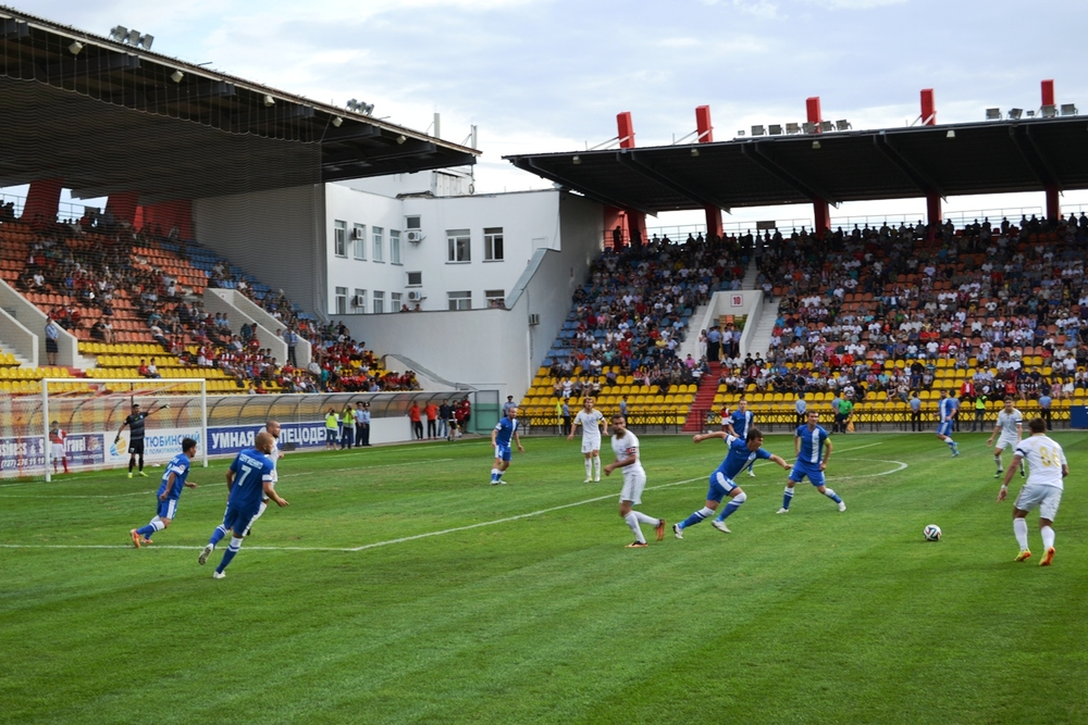 Центральный стадион (Актобе).